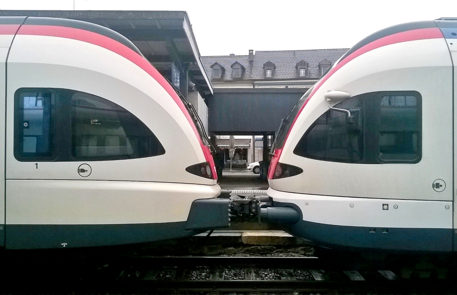 Différence des cabines entre un RABe 522 "Flirt France" et un RABe 523 standart.